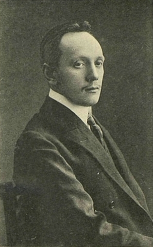 Михаил Андреевич Искрицкий, член Государственной думы от Черниговской губернии, товарищ секретаря III Думы.